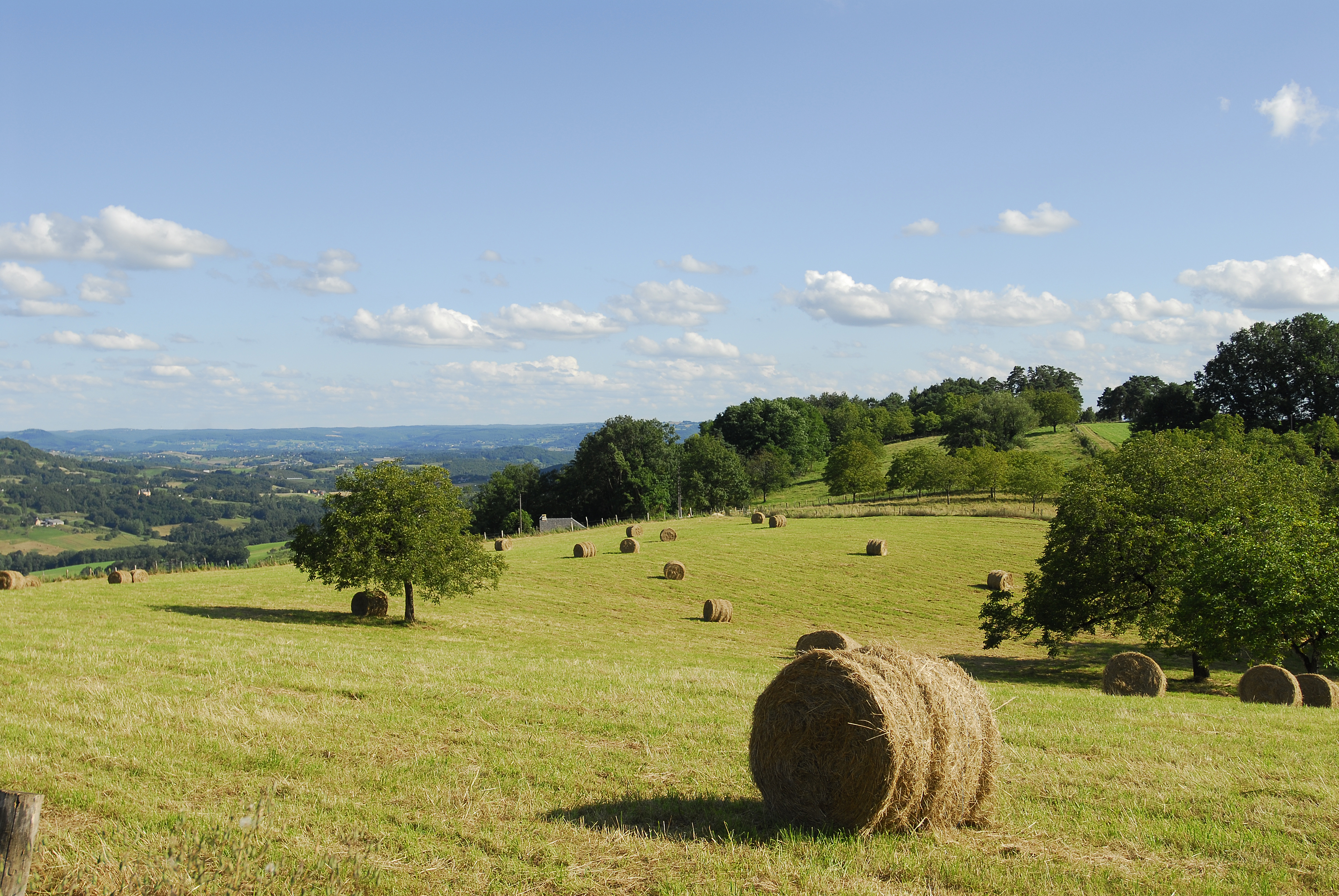 Ayen 2